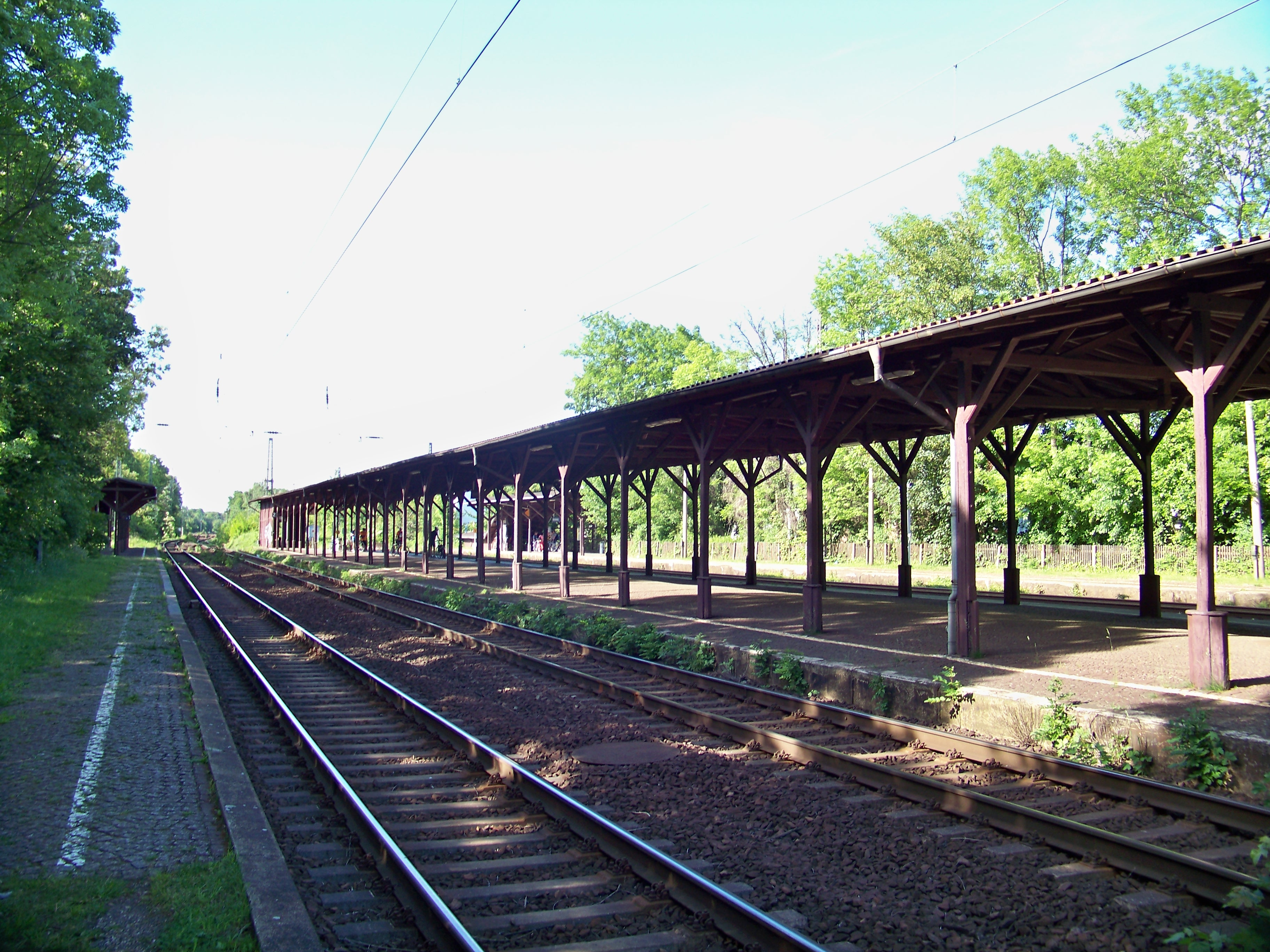 Bahnhof Markkleeberg - Bahnsteige; Drehort für den Film Copacabana (2008), doch darin wurde der Stationsname Tara statt Markkleeberg benutzt.